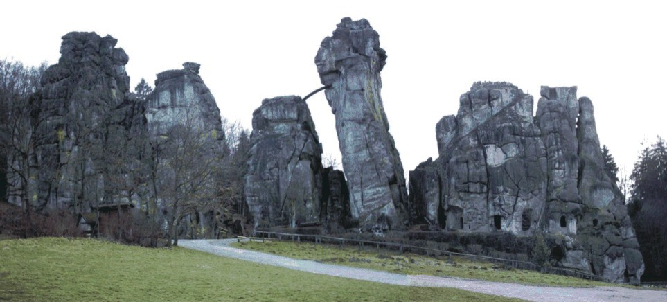 Externsteine im Teutoburger Wald am Hermannsweg